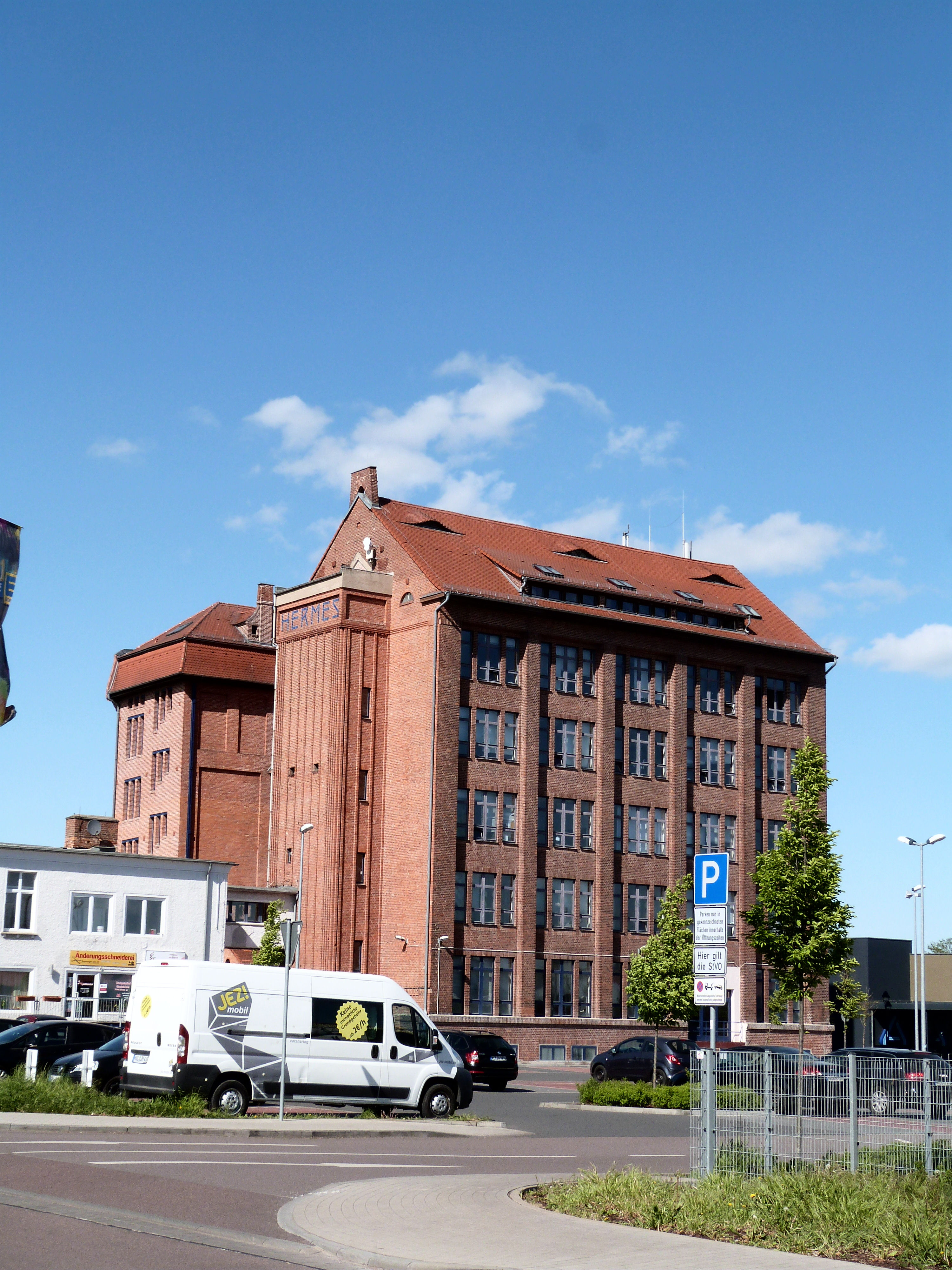 Hermesstraße 5, Halle (Saale), Hermes-Gebäude, Teil der Kunsthochschule Burg Giebichenstein